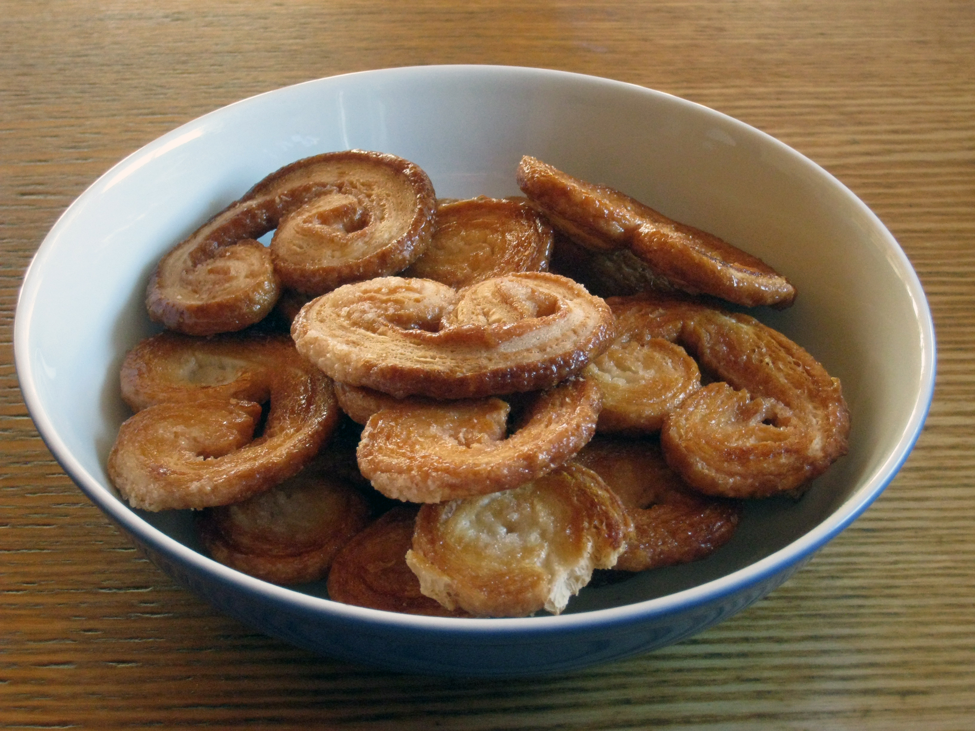 Prussiens